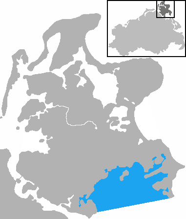 Mecklenburg-Vorpommern, Rügischer Bodden Bay / Lagoon (marked blue)